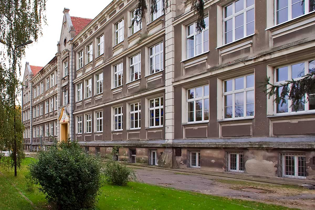 Kożuchów-Szkoła Podstawowa nr 1